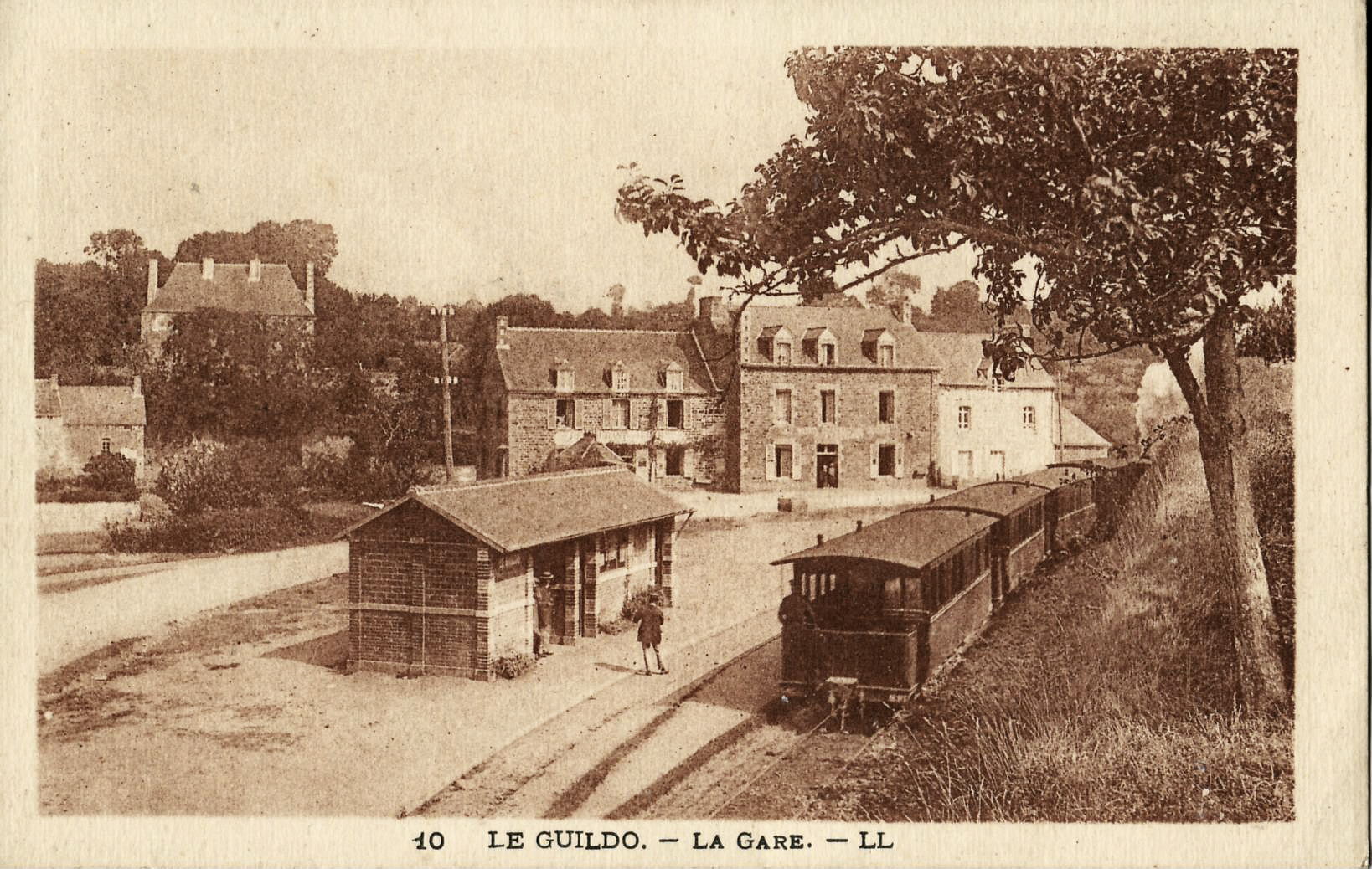 Carte postale ancienne éditée par LL, n°10 : LE GUILDO - La Gare